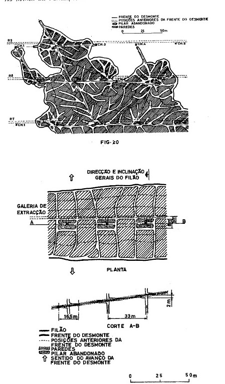 Método de desmonte histórico Mina da Panasqueira